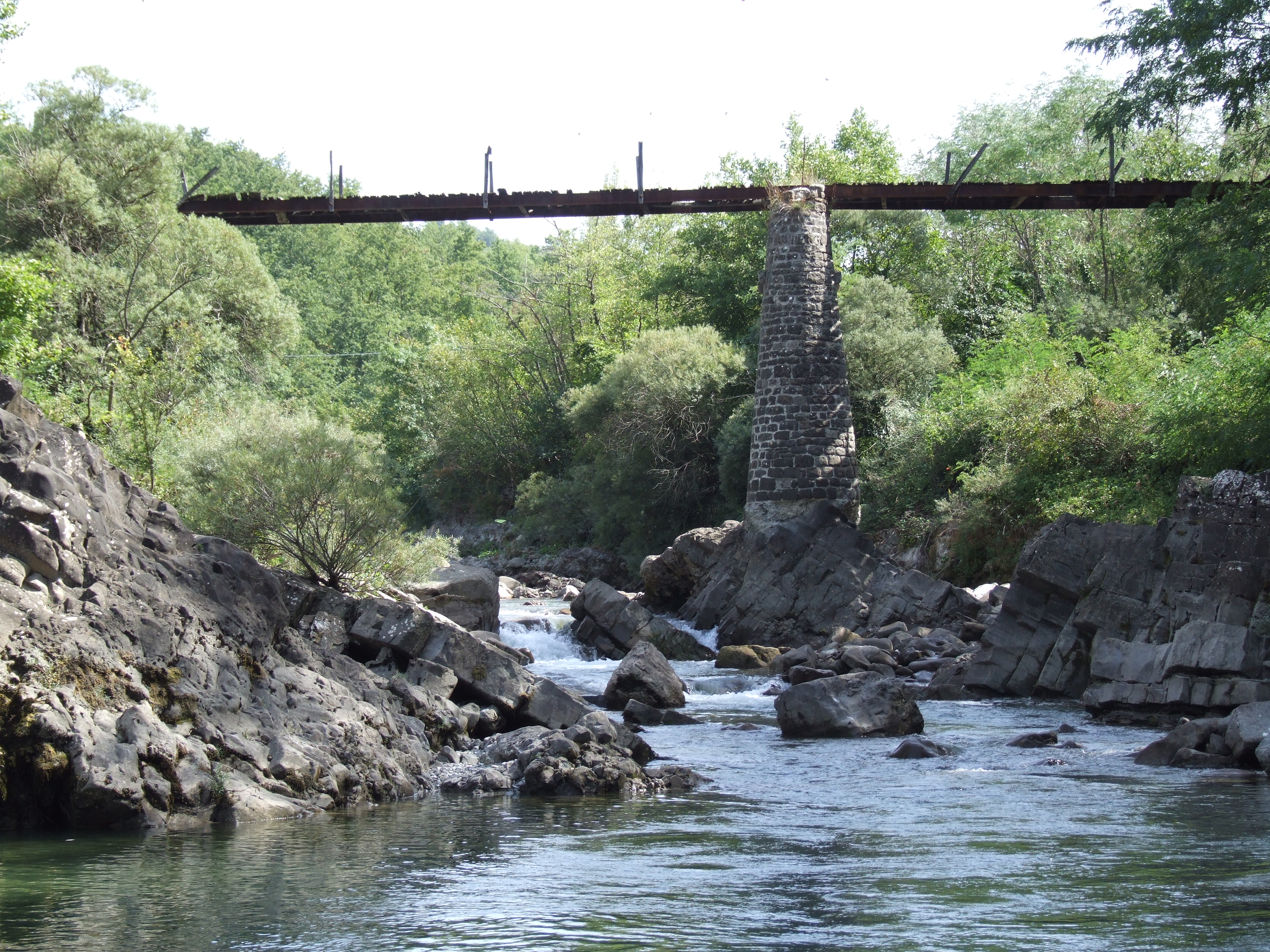 Ponte località Lodio